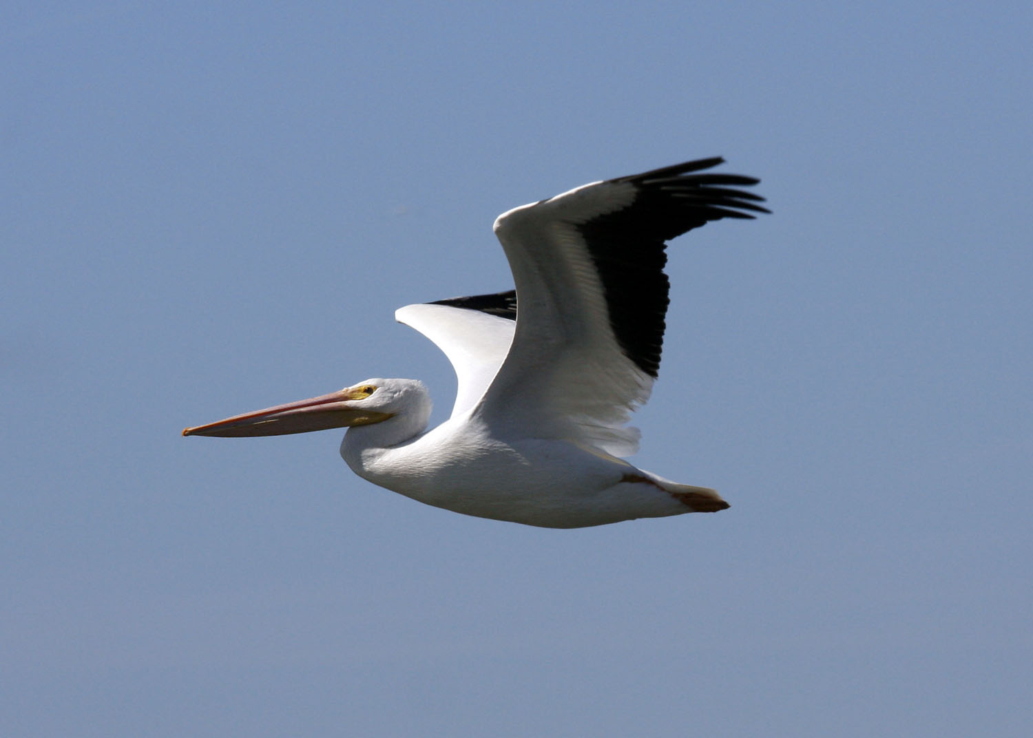 Nashornpelikan (Pelecanus erythrorhynchos) im Überwinterungsgebiet bei Guerrero Negro (Baja California Sur)